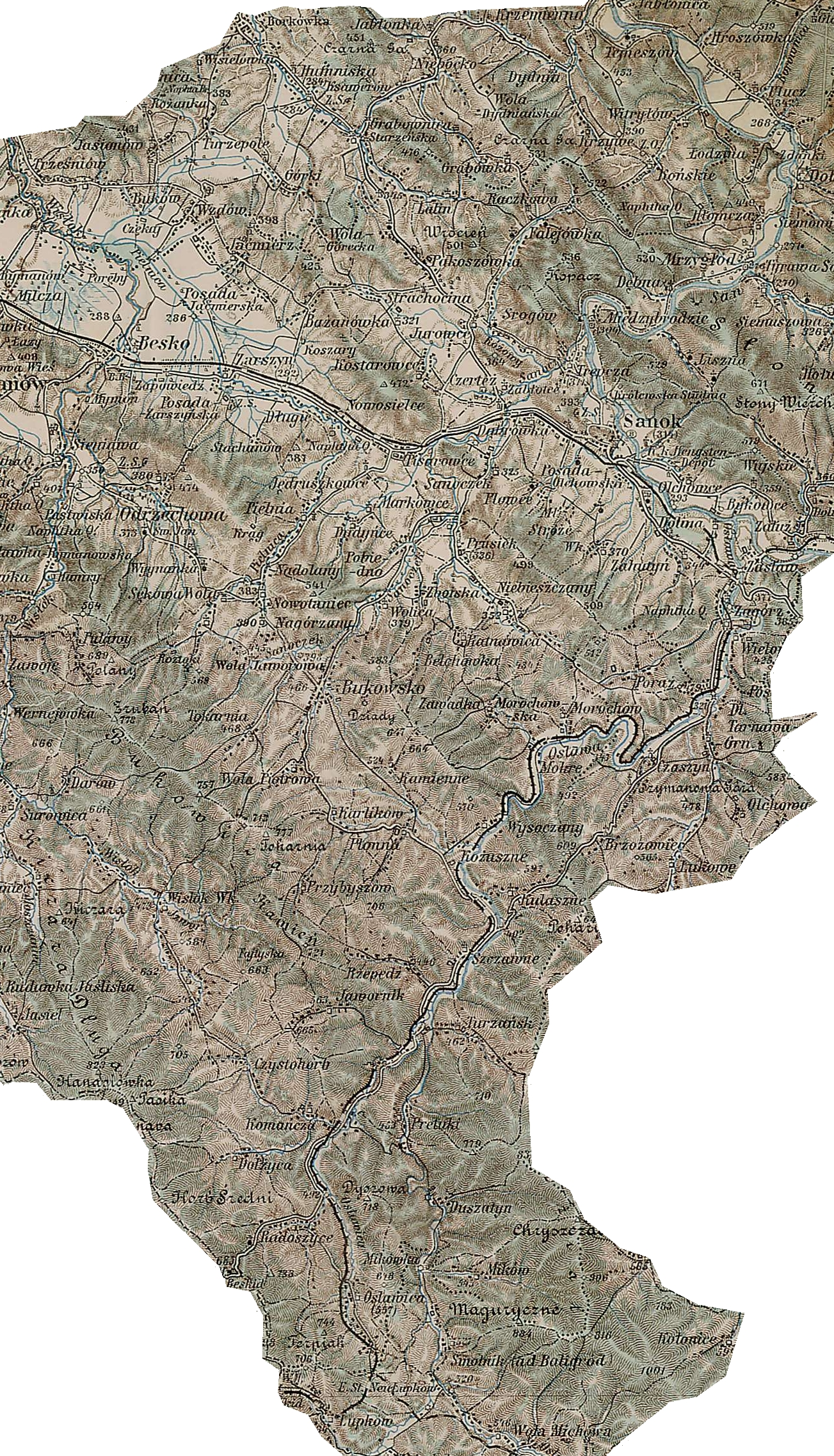 Decanatus Sanocensic Ritus Latini (1914)